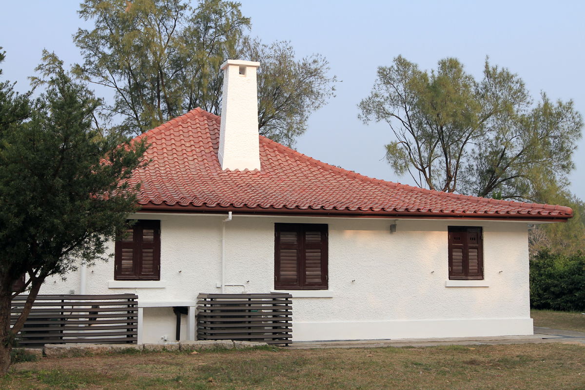 聖士提反書院5號平房 St. Stephen's College, Bungalow No. 5